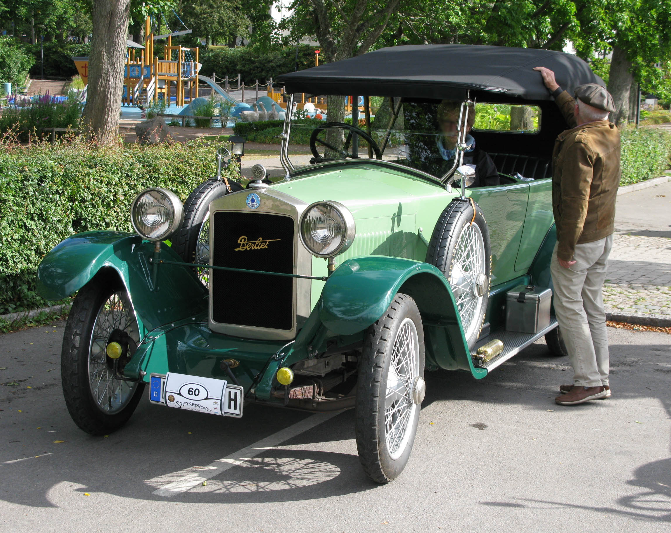 Berliet VHC Torpedo 12CV 1923